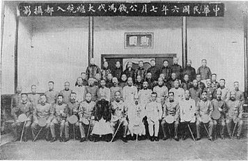 1917年7月，冯国璋代总统（前排左八）进京前与南京各界官员及代表合影